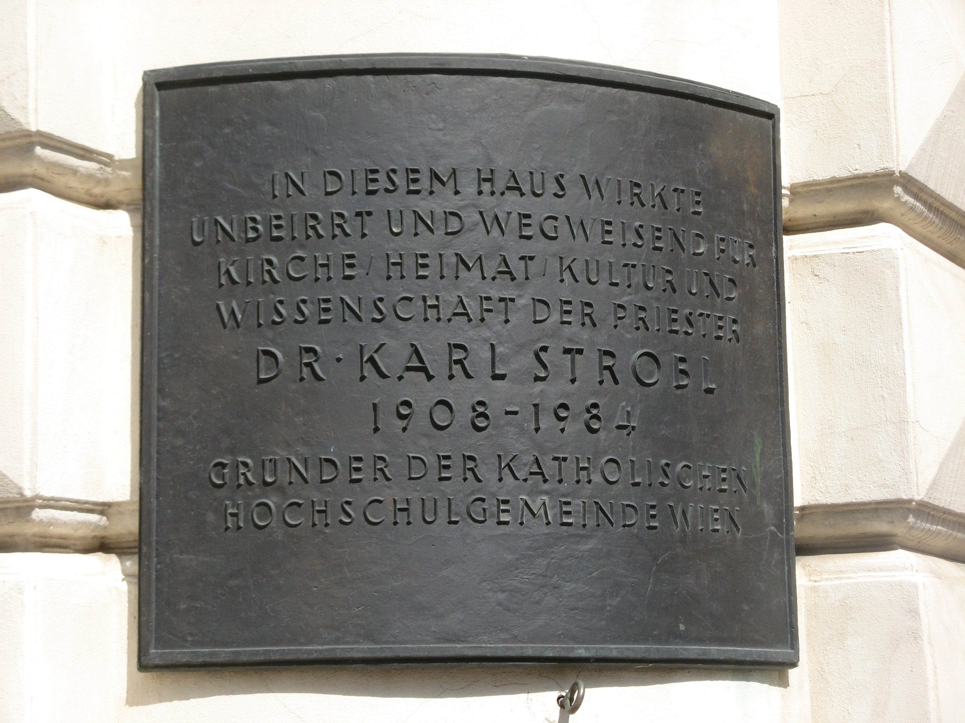 Gedenktafel für Karl Strobl, Ebendorferstraße 8, Wien-Innere Stadt